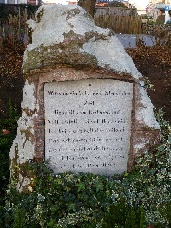 Friedhof der Heimatlosen in Westerland (Sylt)